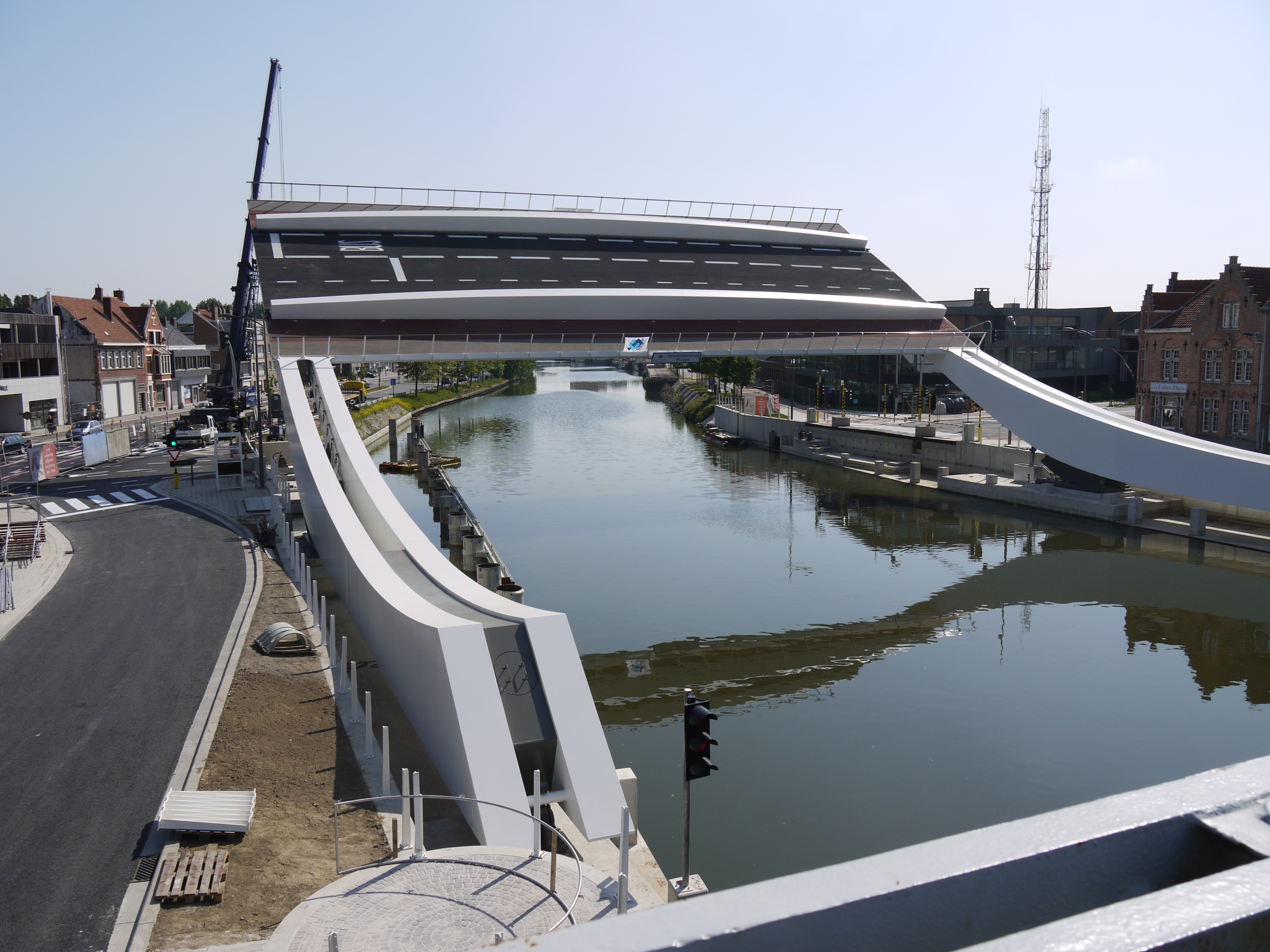 Nieuwe Scheepsdalebrug, Brugge